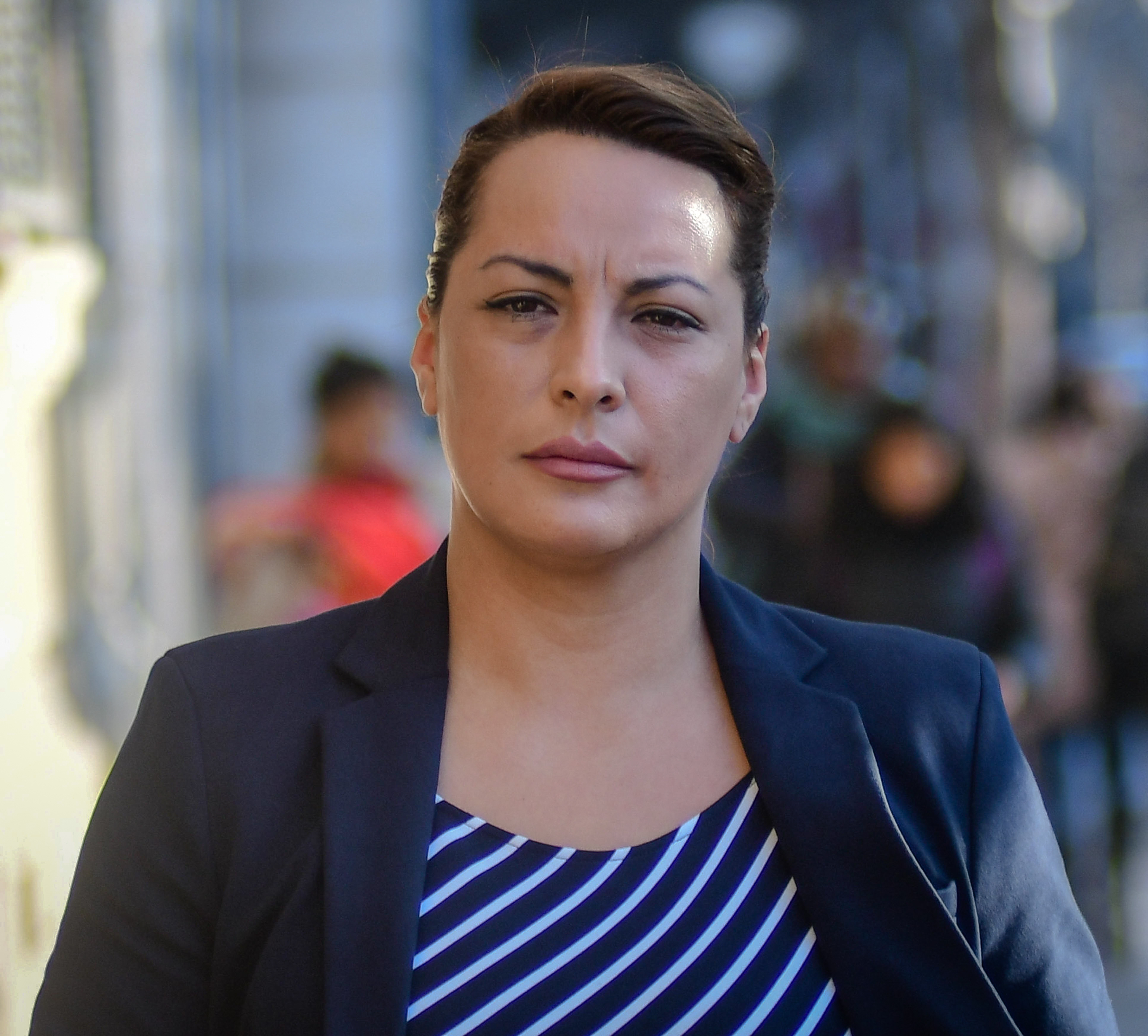 Santiago/ Intendenta asiste a diversas reuniones